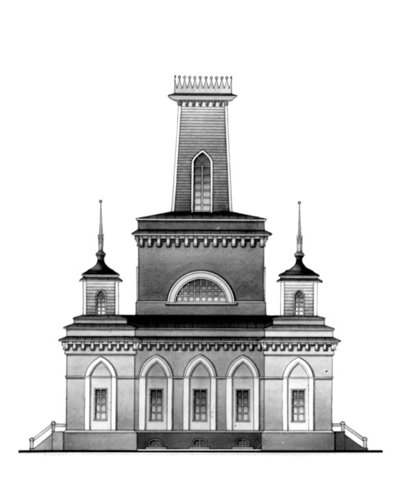 Беларуская (тарашкевіца): Чачэрск (Čačersk), Рынак (Rynak). Ратуша